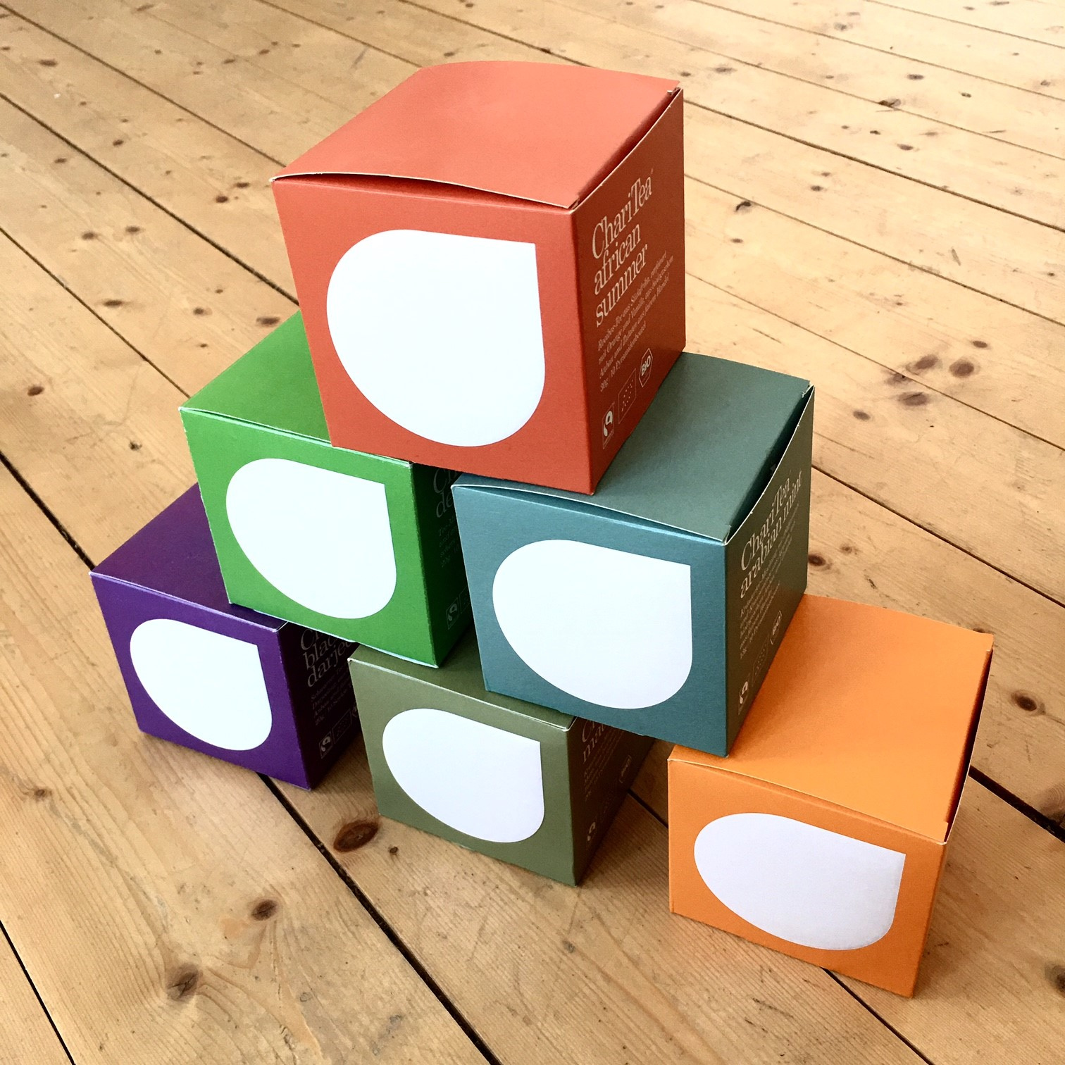 Das Bild zeigt verschiedene Sorten losen ChariTea. In den würfelförmigen Kartons befinden sich die hochwertigen Pyramidenbeutel.